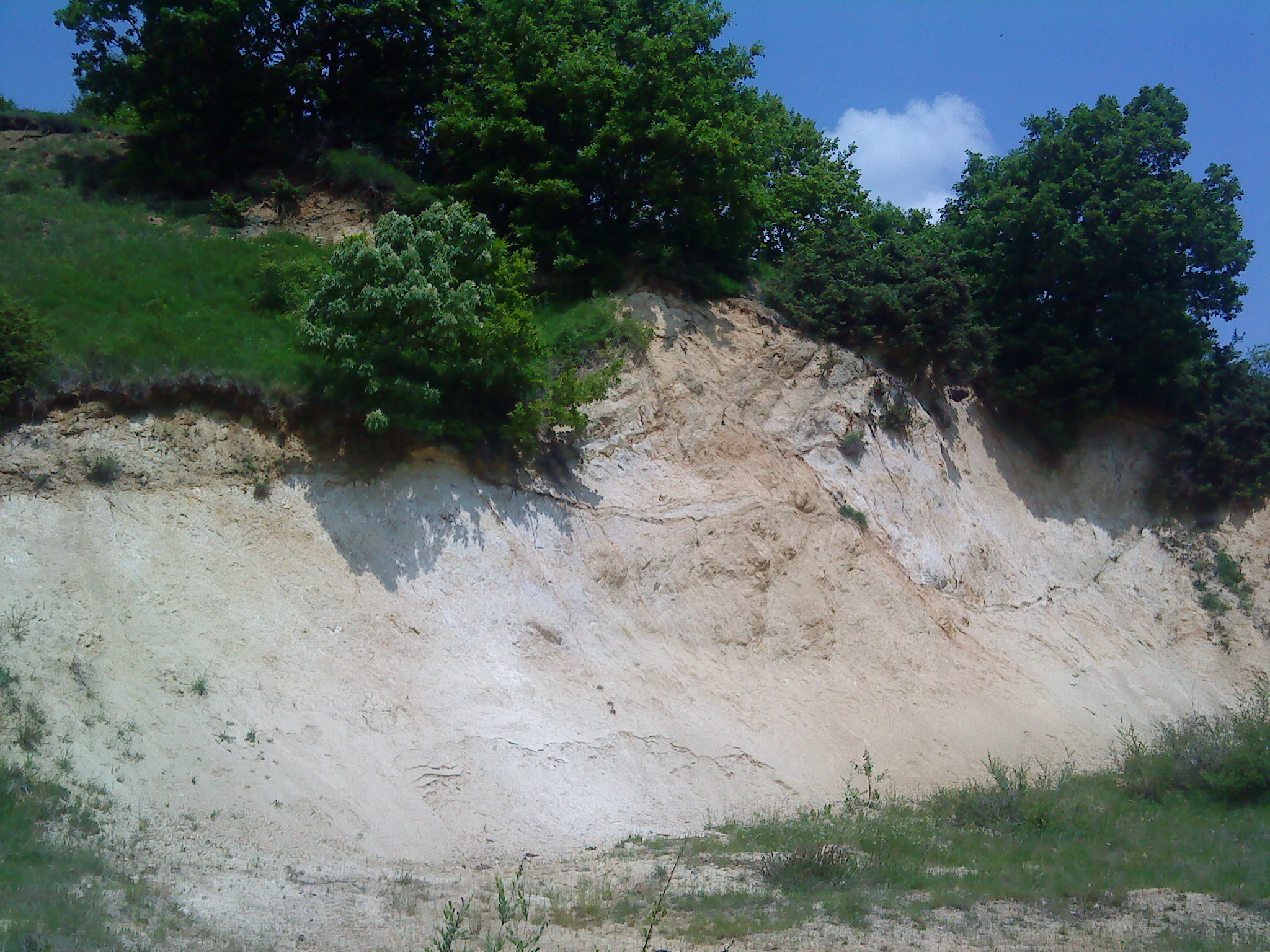 Јашарова кула с.Кажани